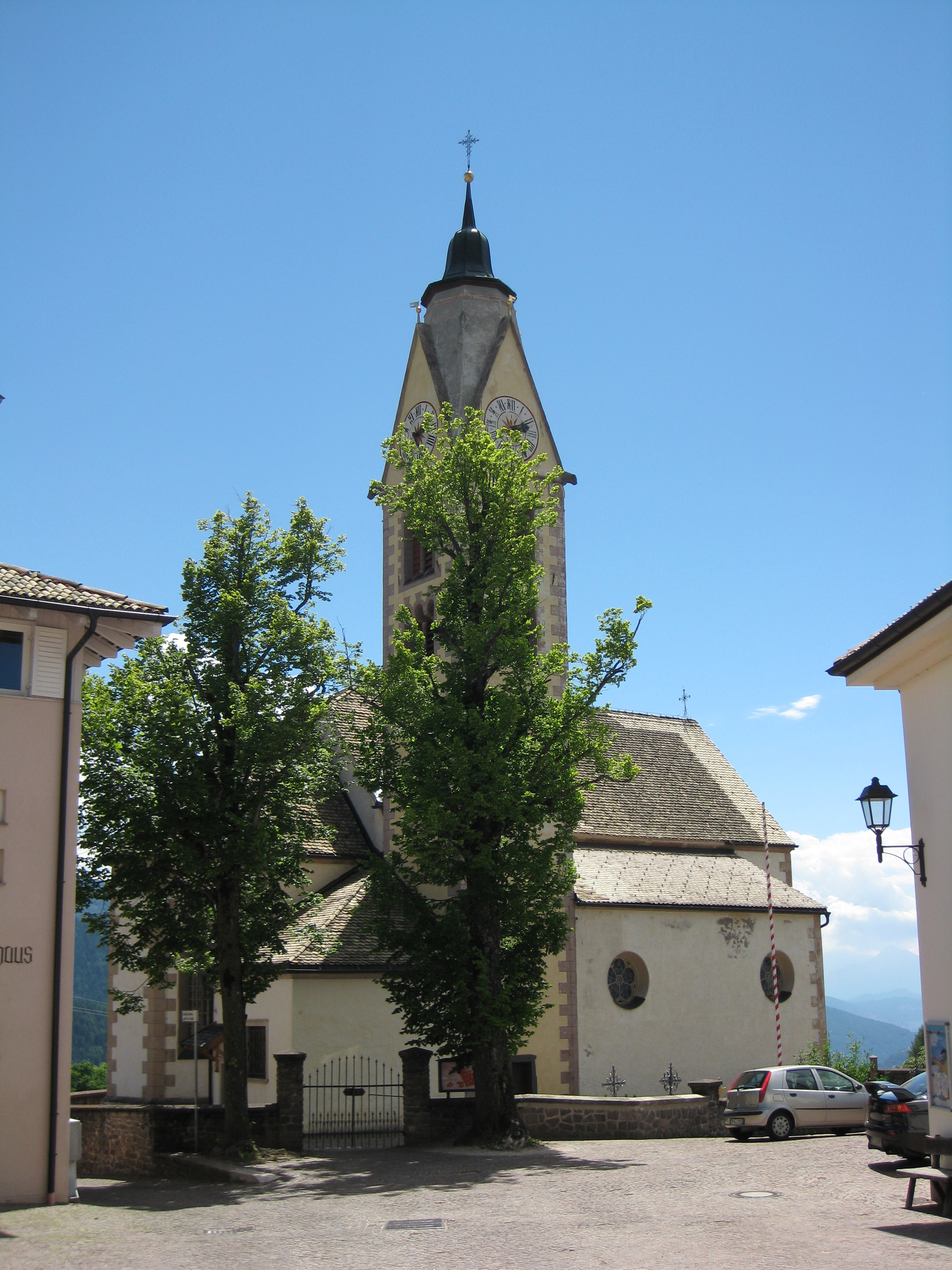 Pfarrkirche St. Katharina mit Friedhof in Altrei